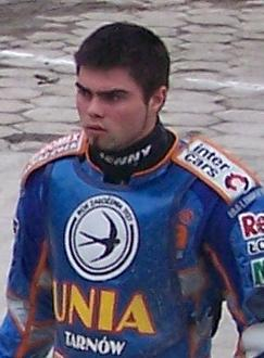 Paweł Hlib, żużlowiec (a speedway rider from Poland).